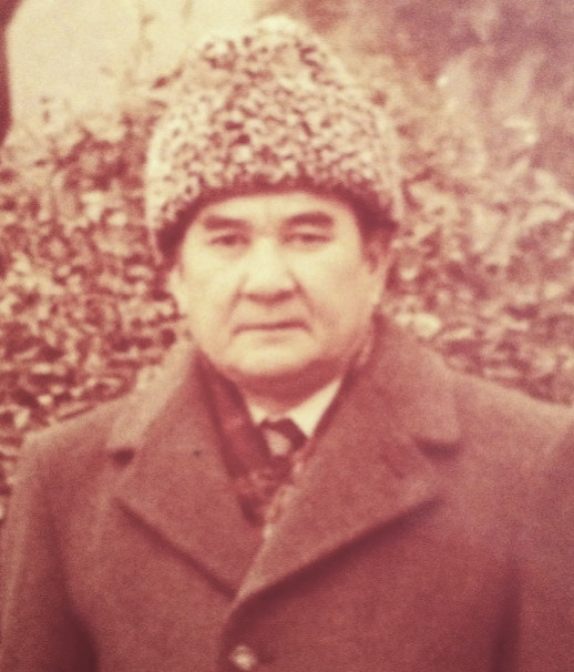 Қазақша (кирил): Темірғали Нәренұлы